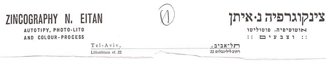 נייר עסקים של צינקוגרפיה נ. איתן ברחוב לילינבלום בתל אביב. נסרק ע"י אורה ספיר.